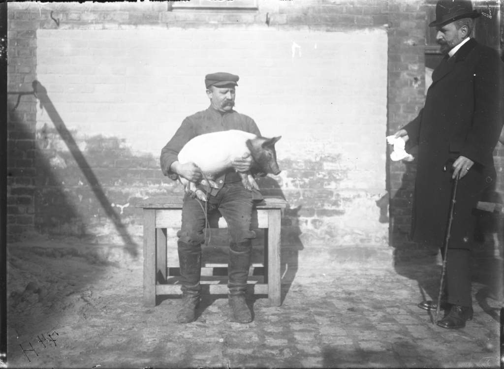 Prof Simon von Nathusius (1865-1913), Halle university at the "Haustiergarten" in 1911